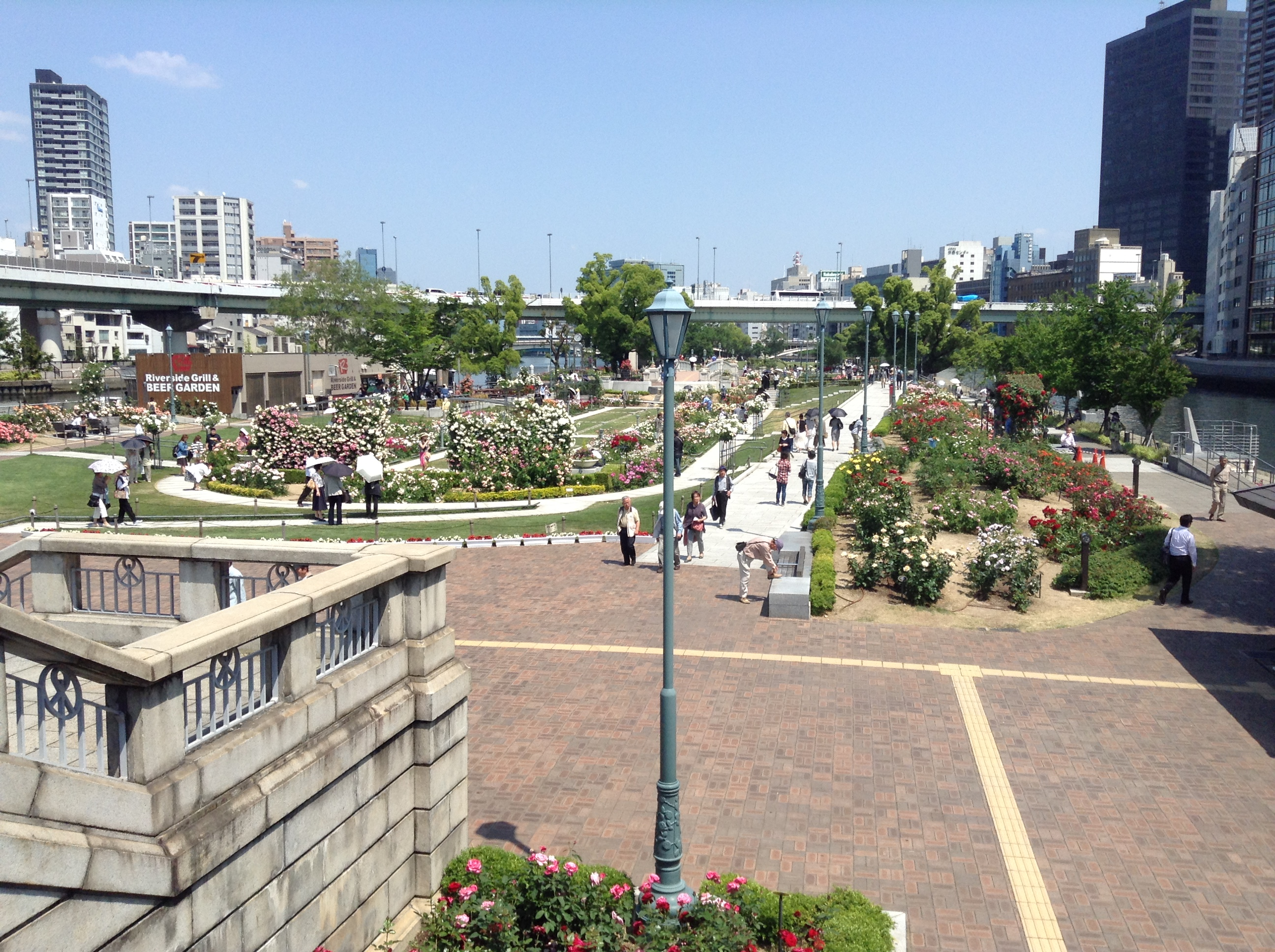 中之島公園のバラ園